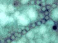 Vírus da Hepatite A - corte de miscroscopia eletrônica